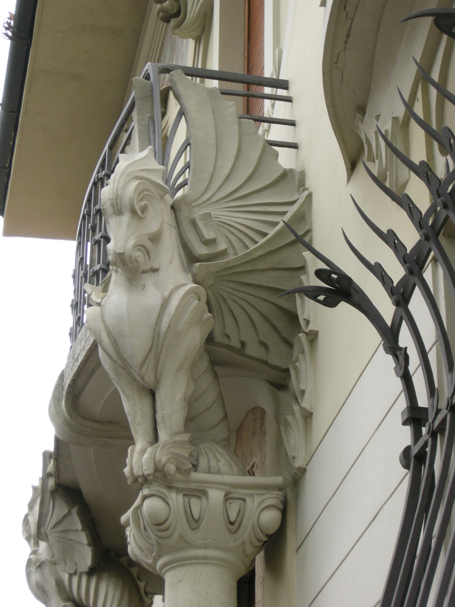 Villino lampredi n.13